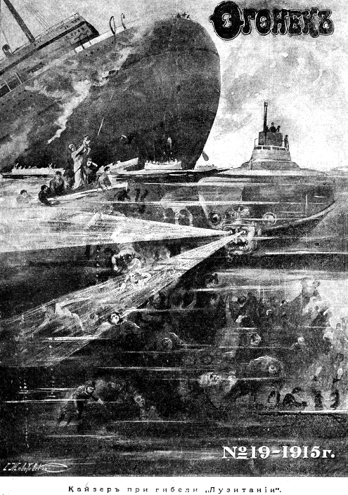 Кайзер при гибели "Лузитании"